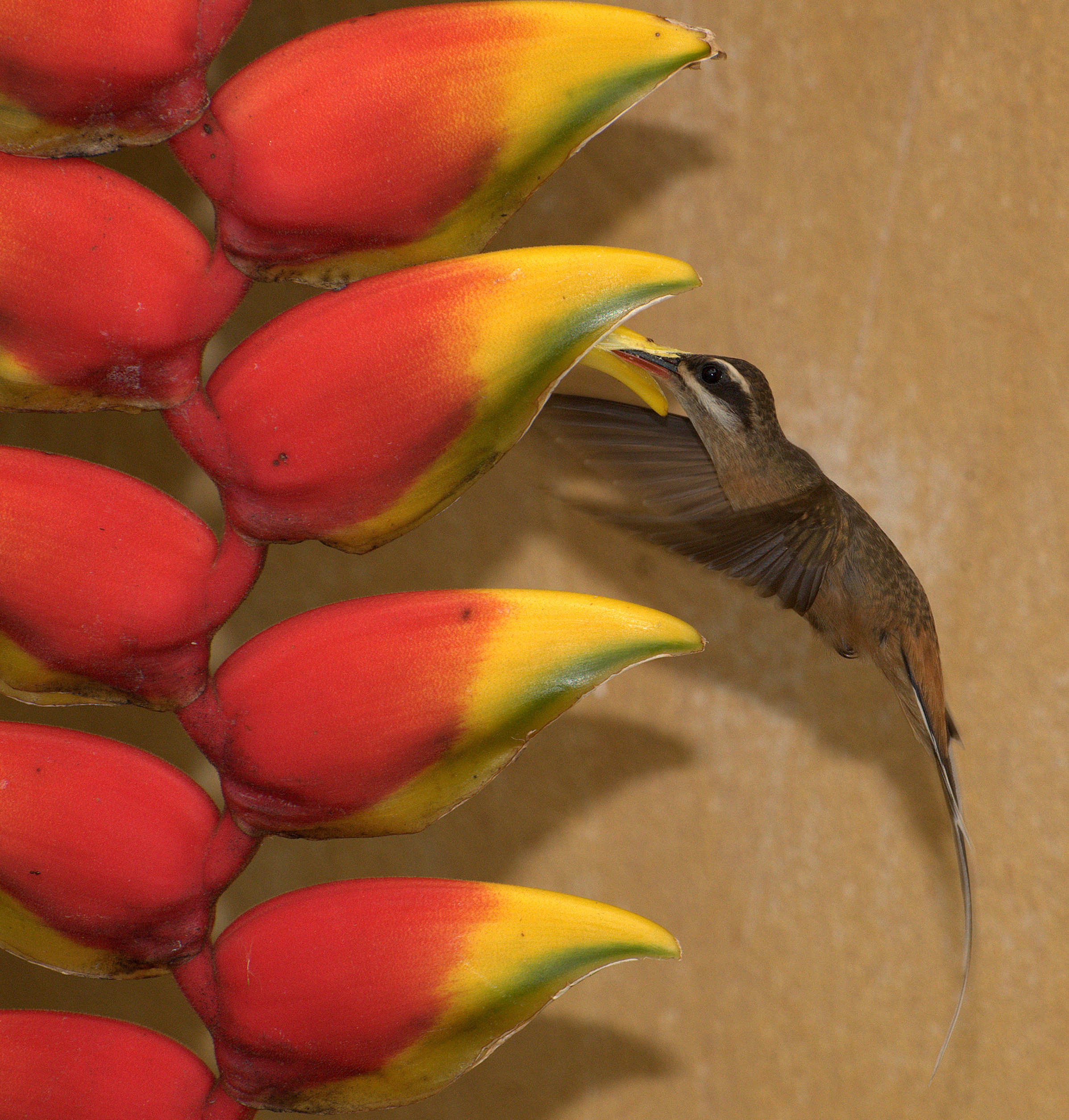 Piraju-SP - Brasil